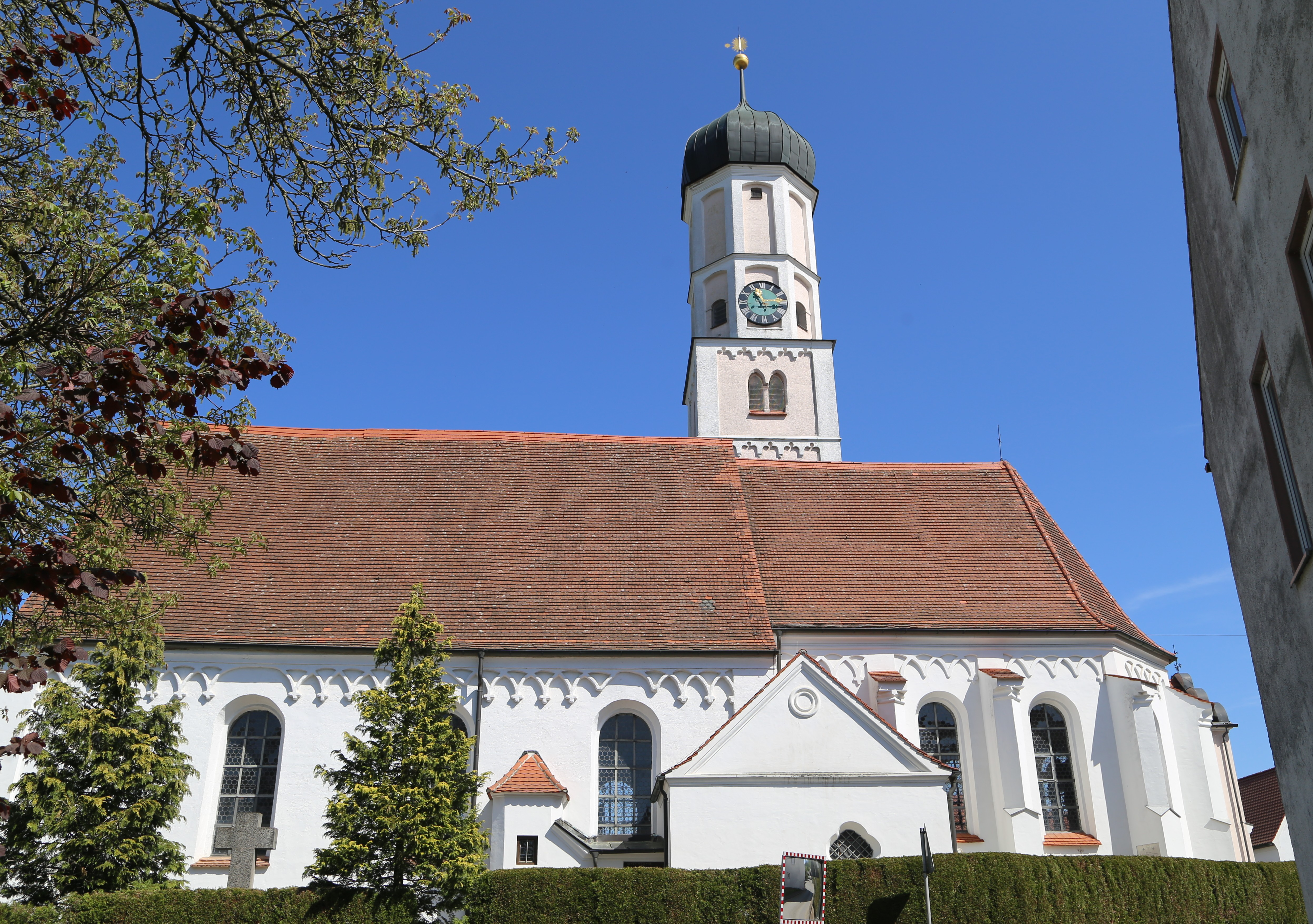 Vitusstraße 4, Steinekirch, Zusmarshausen; Katholische Pfarrkirche St. Vitus, Saalbau mit gotischem Fries, eingezogenem Chor, nördlichem Turm mit Zwiebelhaube und östlich an den Chor angebauter Ölbergkapelle von um 1790, spätgotischer Bau des späten 15. Jahrhunderts, barocker Ausbau 1760, Turmuntergeschosse 13./14. Jahrhundert; mit Ausstattung; Friedhofsmauer.